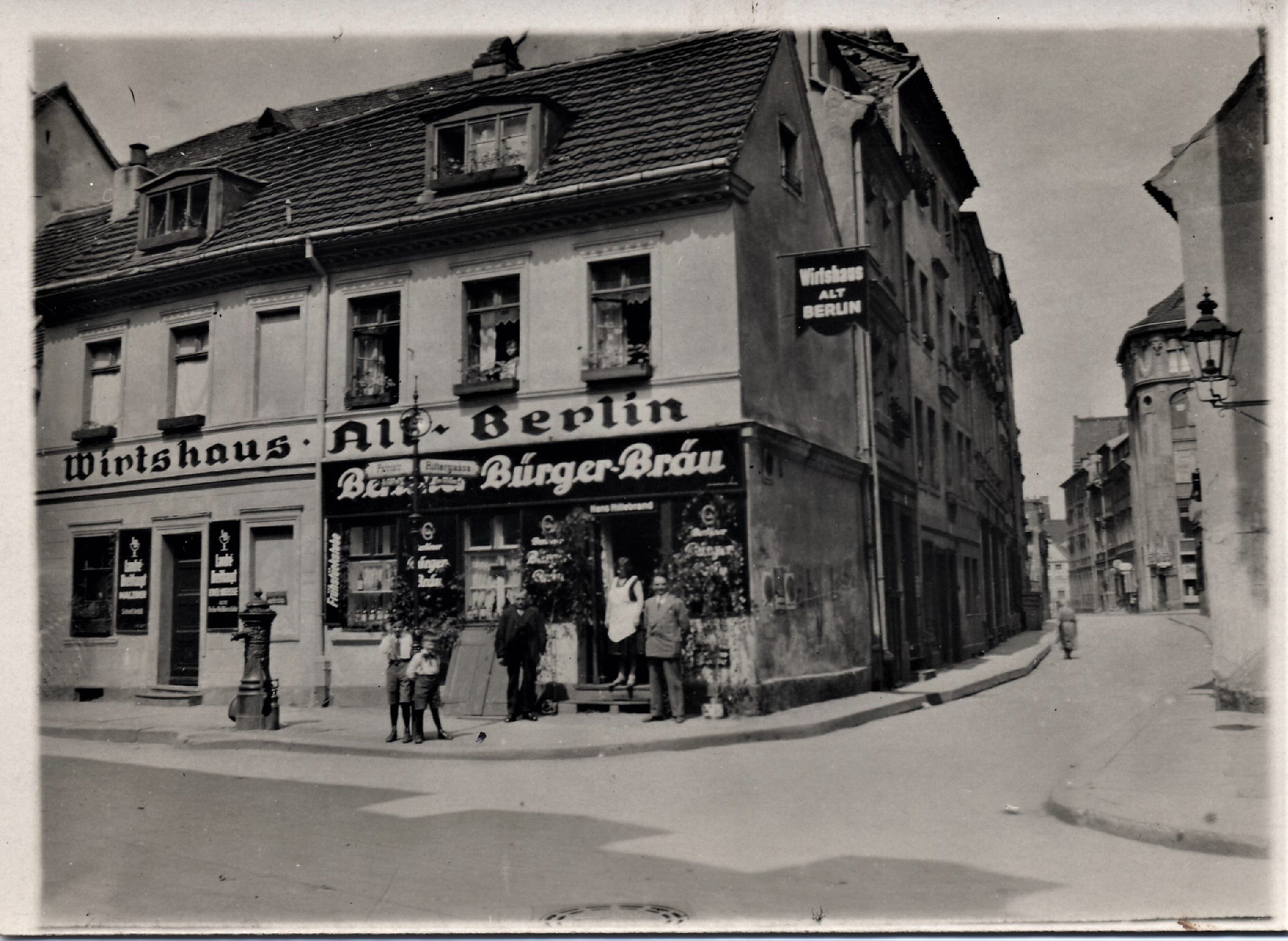 Die Aufnahme in Berlin SW mit dem Wirtshaus "Alt-Berlin" zeigt vor dem Hause einen Ventilbrunnen, wie sie in Berlin und Berliner Vororten aufgestellt waren. Die Ansicht stammt von 1925. Das Haus Petrigasse 22/ Ecke Rittergasse in Berlin SW 19 gehörte den Schraderschen Erben und wurde von Schankwirt K. Riedel verwaltet. (Berliner Adressbuch 1925, IV. Teil Seite 740, #5482). Die Ritterstraße ist in Berliner Adressbuch 1925, IV. Teil Seite 810, #5551 beschrieben. Die Darstellung auf dem Straubeplan IIIA von 1910 findet sich auf mit dem Stichwort Friedrichsgracht oder Fischerinsel 6.